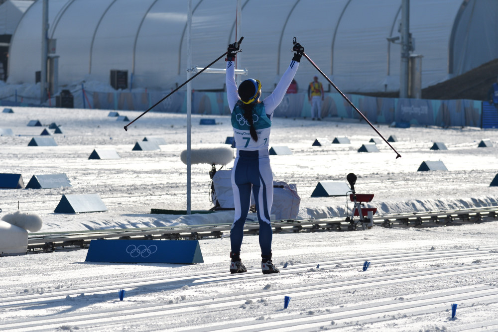 Krista Pärmäkoski at PyeongChang 2018 Winter Olympic Games